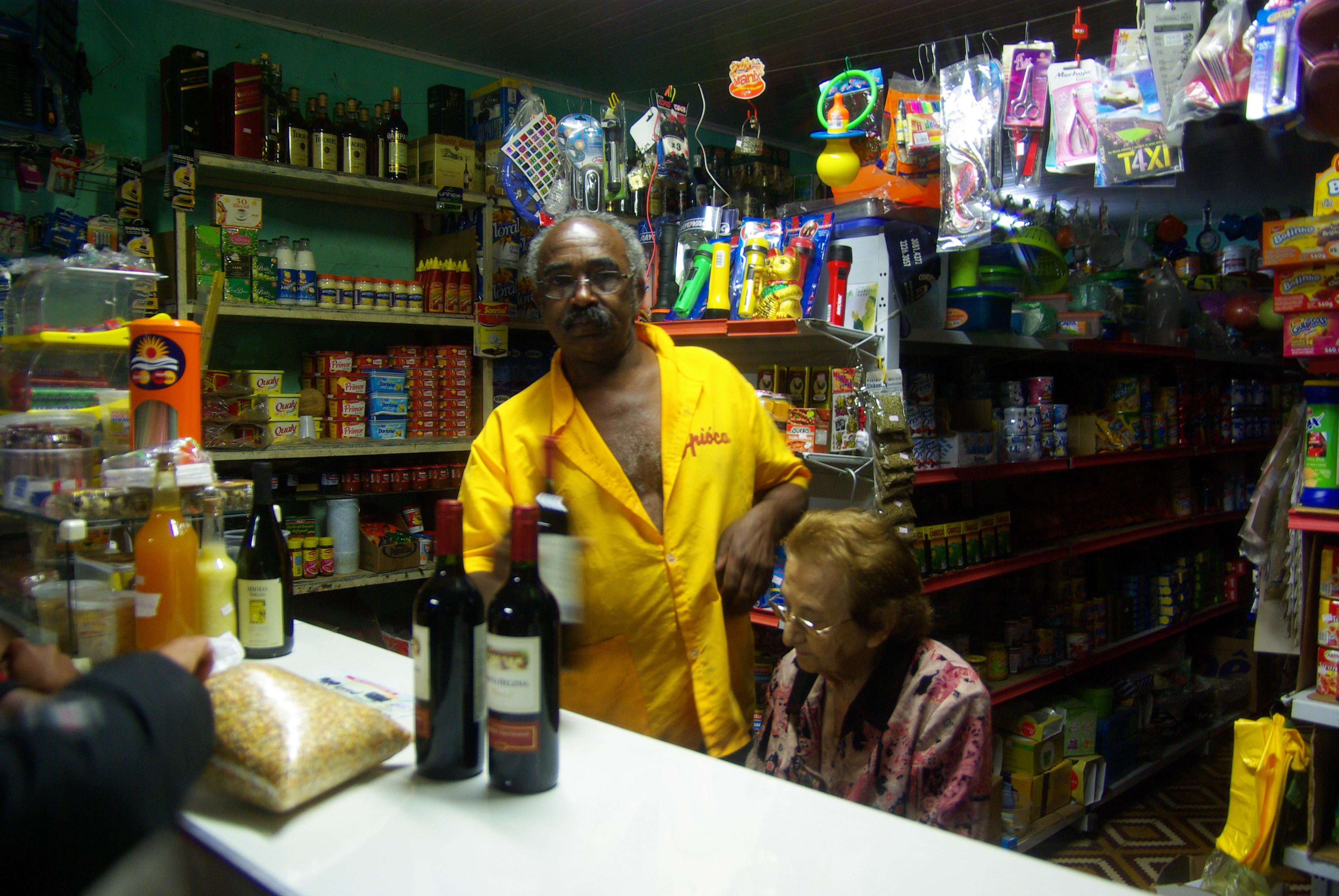 Guaramiranga